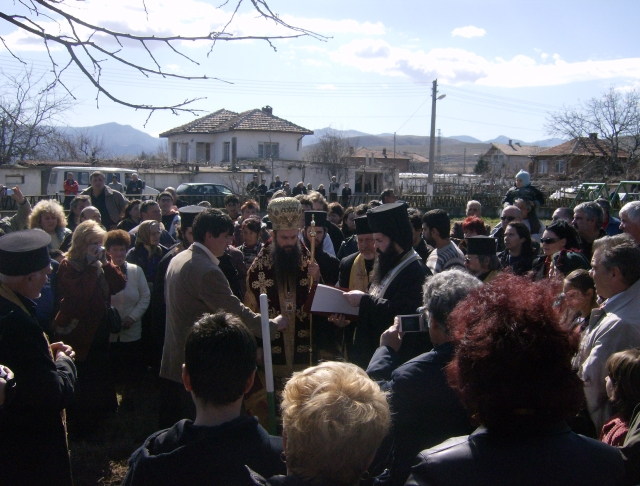 Първа копка православен храм ,Св.Георги,с.Триводици